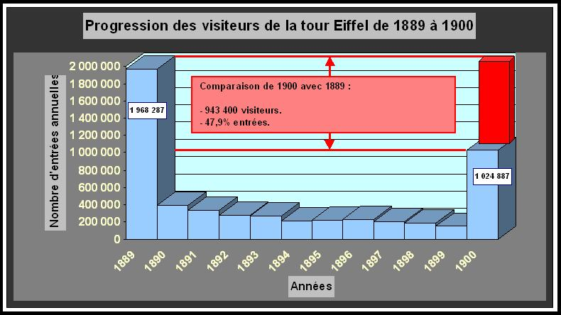 Graphique montrant la progression du nombre de visiteurs de la tour Eiffel entre les Expositions universelles de 1889 et 1900, se tenant à Paris. Réalisé sous Excel par moi-même (Kuxu), d'après les chiffres du site officiel de la tour Eiffel.